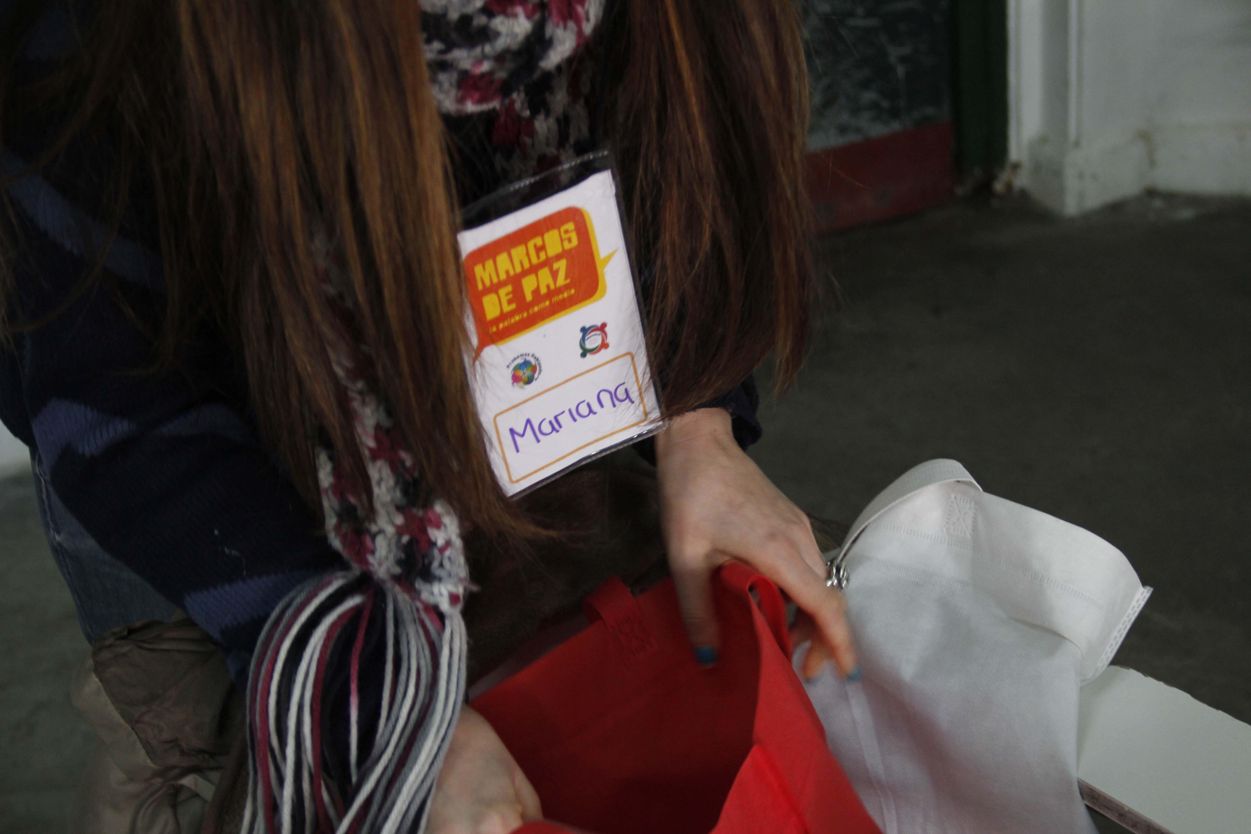 Facilitadora de Marcos de Paz lleva adelante sus tareas dentro del Penal de Marcos Paz